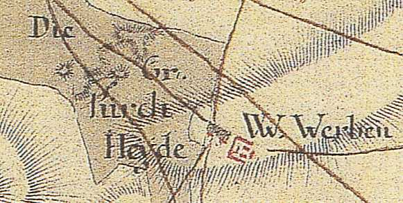 Karte von Werben (Gemeindeteil von Glienick, Ortsteil der Stadt Zossen, Brandenburg, Deutschland), aus den Jahren 1767 bis 1787, Land Brandenburg, Deutschland